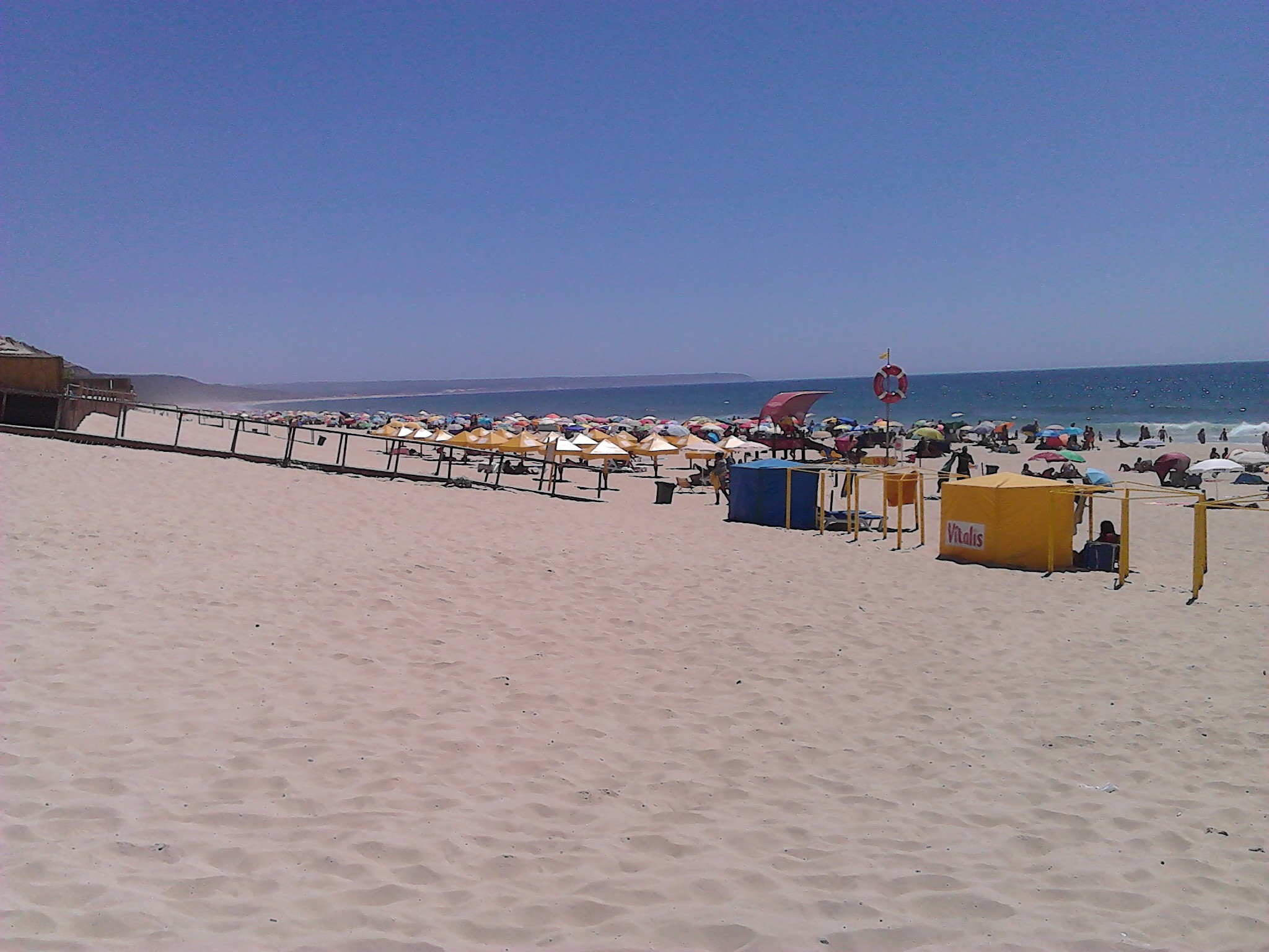 Praia da Fonte da Telha